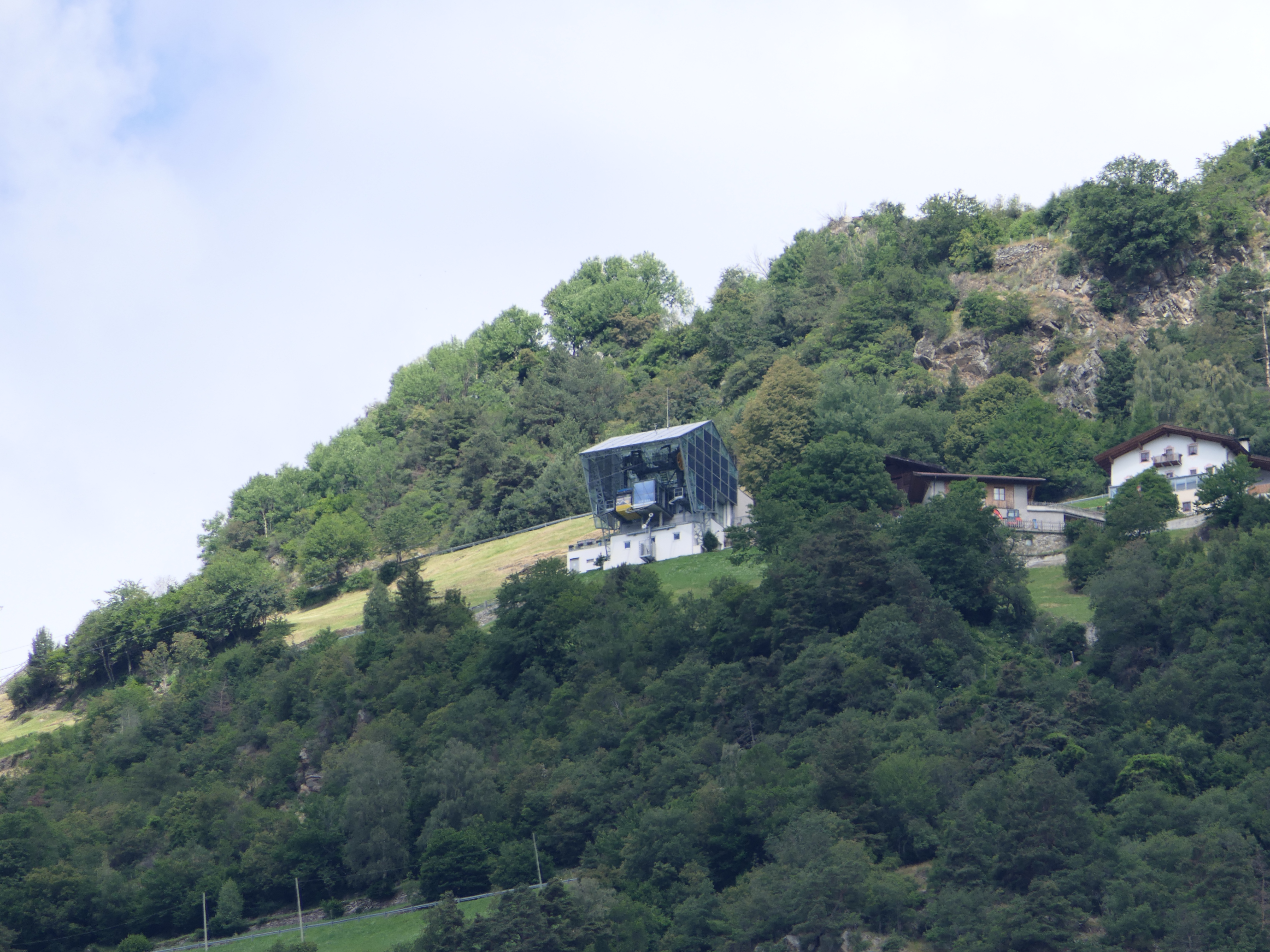 Die Bergstation der Seilbahn Sonnenberg, eine Luftseilbahn in Südtirol, die von Naturns nach Unterstell führt.